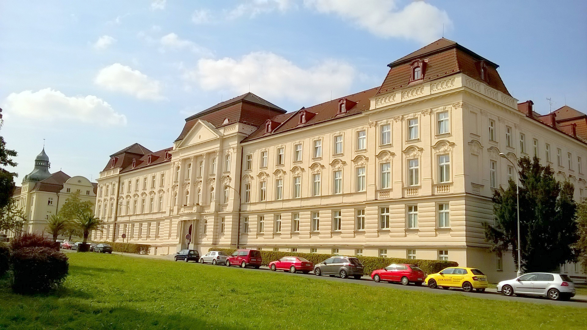 Fakulta veřejných politik